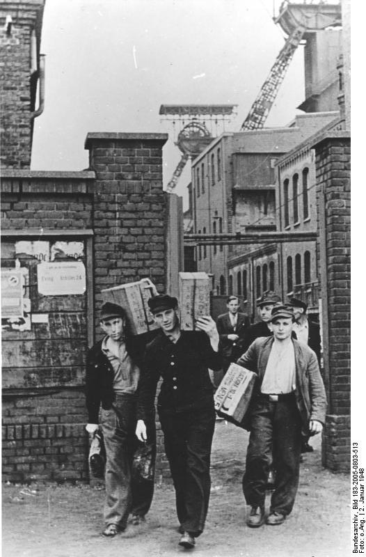 Ansporn-Paket für deutsche Bergleute Die Ausgabe eines dritten CARE-Paketes an die Bergleute im deutschen Ruhr-Bergbau wurde unter Zugrundelegung von bestimmten Bedingungen in Aussicht gestellt. Die deutschen Bergarbeiter müssen ihre Förderleistungen um 16% gegenüber der Kohlenförderung im Monat November 1947 steigern und diese Leistung 4 Wochen beibehalten. Die Pakete enthalten kalorienreiche Lebensmittel neben Kaffee, Tee und Zigaretten und stammen ausschließlich aus Beständen der amerikanischen Besatzungsmacht. Unser Bild zeigt deutsche Bergarbeiter nach dem Empfang von CARE-Paketen. 2-1-48 Illus-dpd